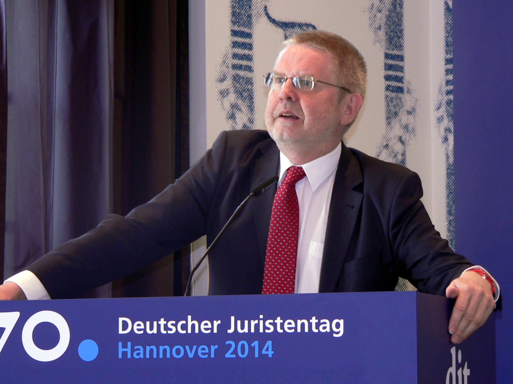 Prof. Dr. Hans-Günter Henneke auf dem 70. Deutschen Juristentag am 18.9.2014 in Hannover